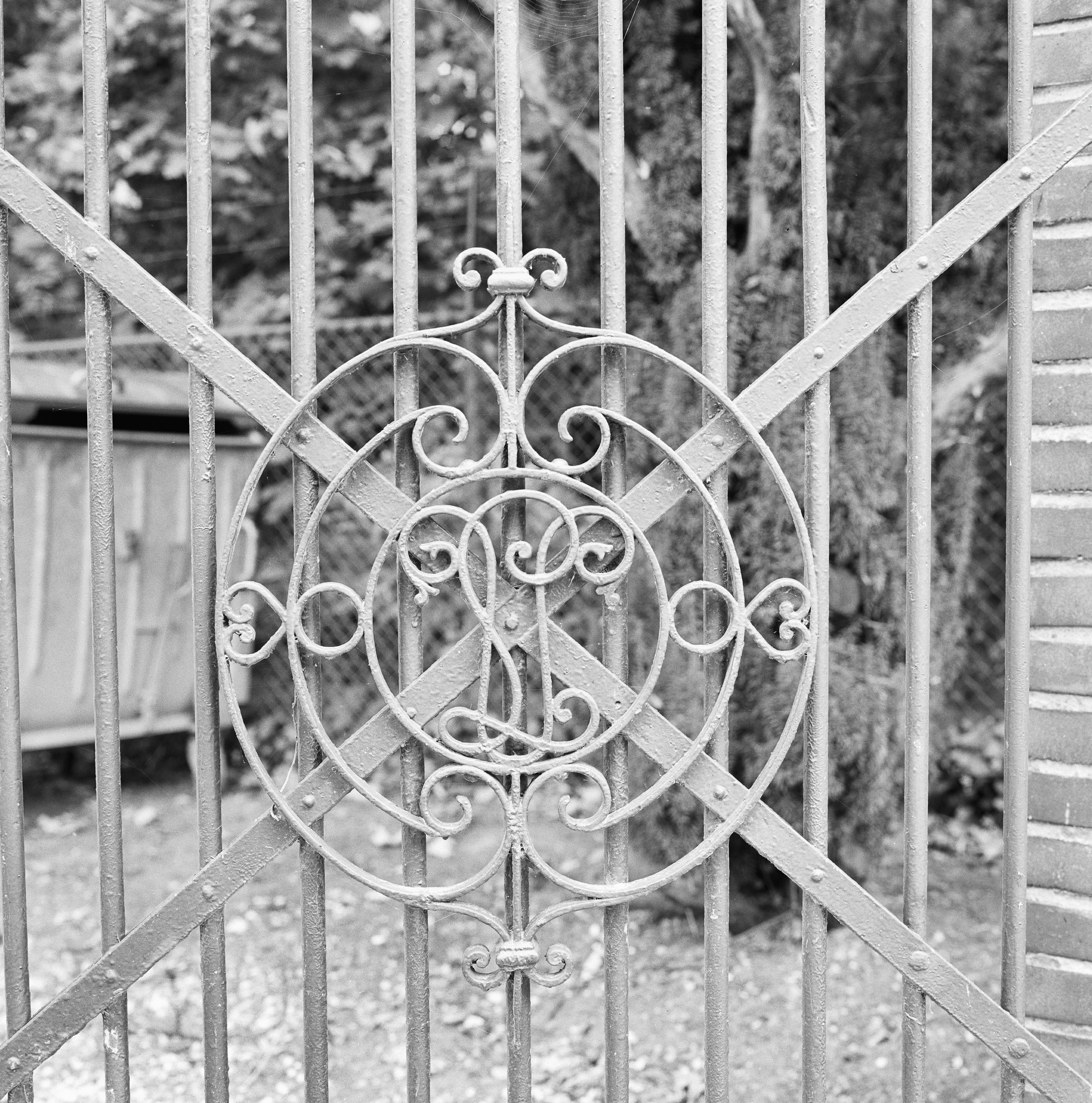 Zusters Van De Onze Lieve Vrouw Der Retraite: Exterieur detail van het smeedijzeren hek tussen Kapellerlaan 38 en Kapellerlaan 40